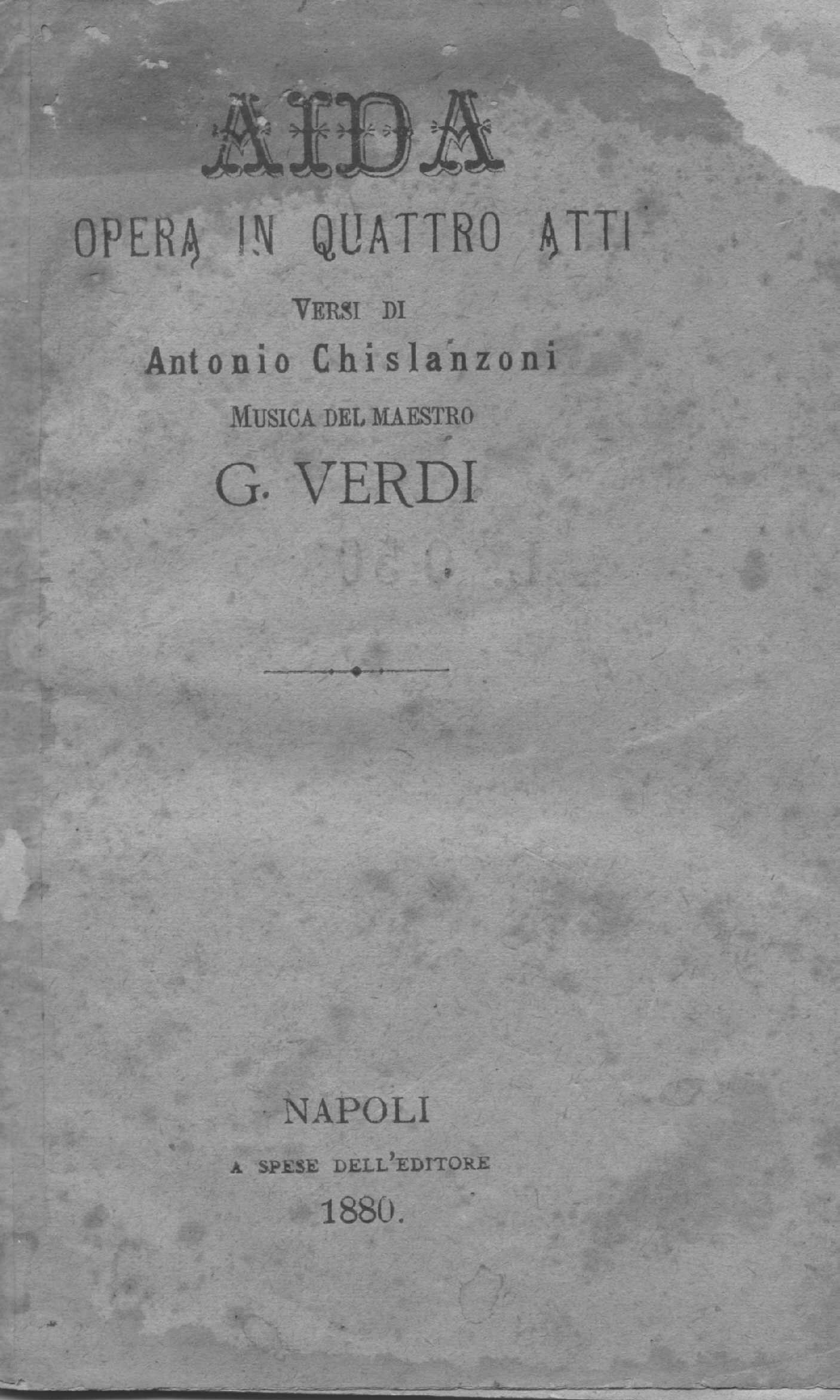 Locandina della prima dell'Aida all'Arena di Verona. Aida - Napoli ed. del 1880, collezione Francesco Paolo Frontini.